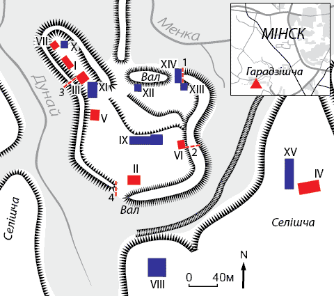 Схема гарадзішча і селішча на р. Менцы і месцы археалагічных раскопаў. (Крыніцы: карта "Городище на р. Менке, неподалеку от Минска. IX - нач. XI в."; карта "План городища на р. Менке")